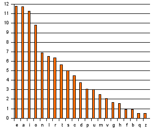 Frequenze ordinate delle letteere nell'alfabeto italiano